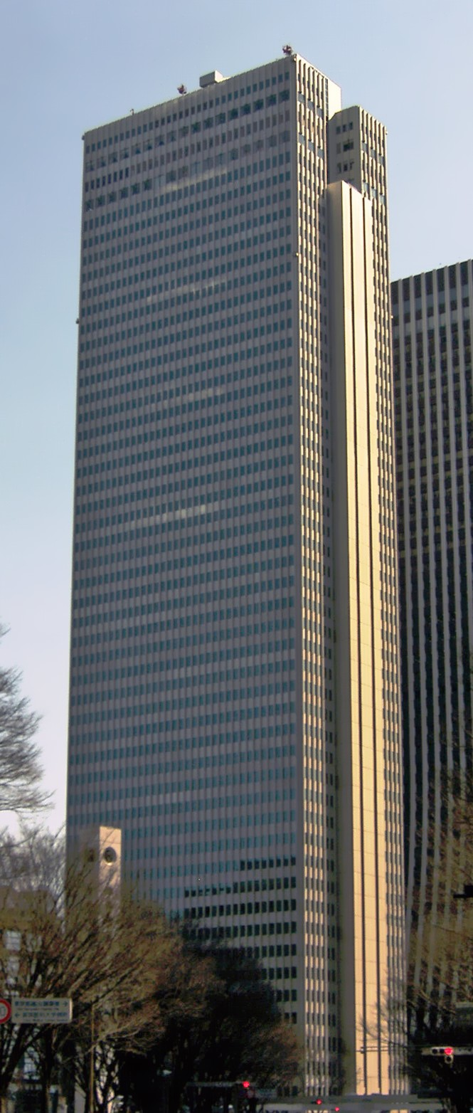 Shinjuku nomura Building_ Tokyo Japan